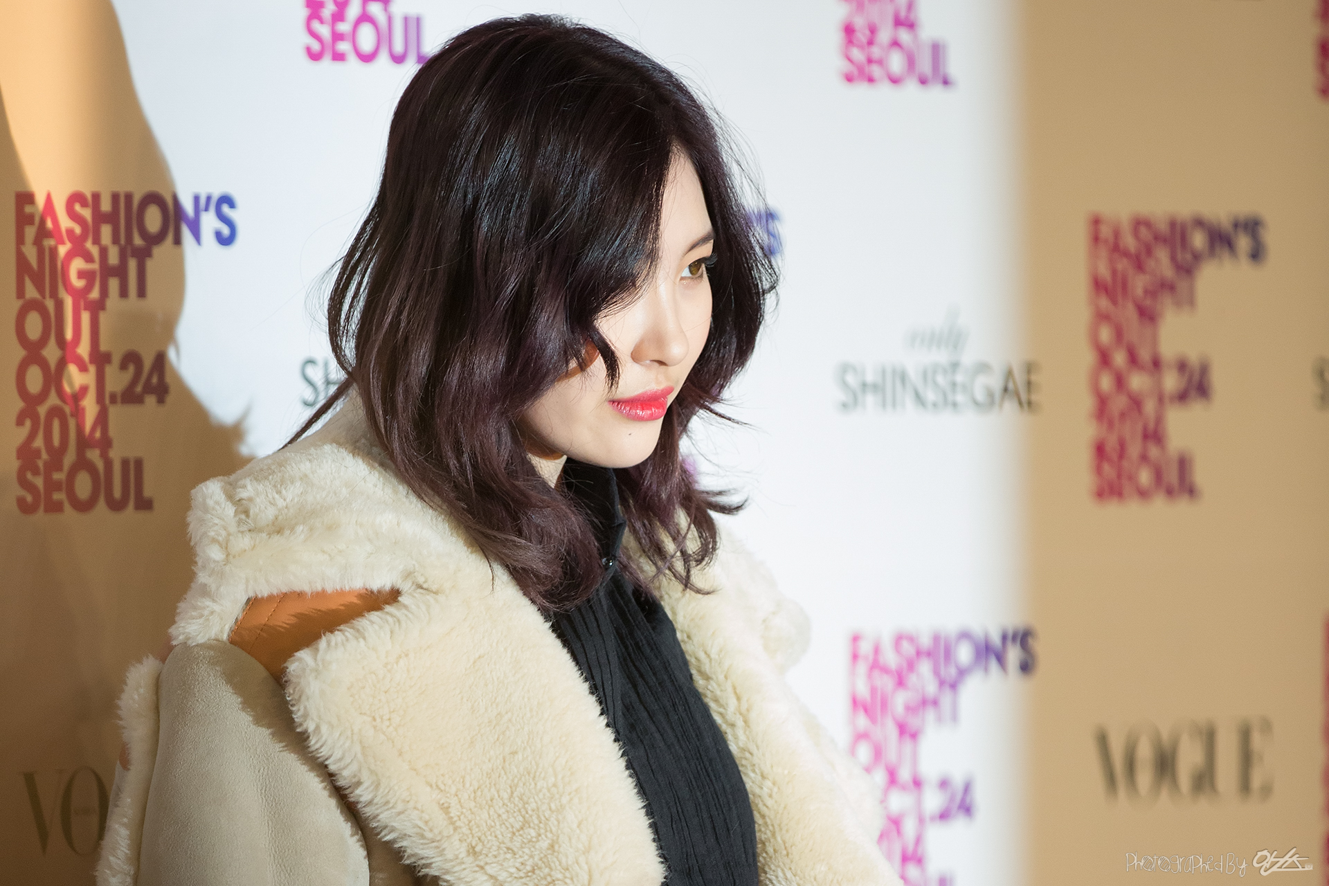 보그 FASHION NIGHT OUT 2014 포토월